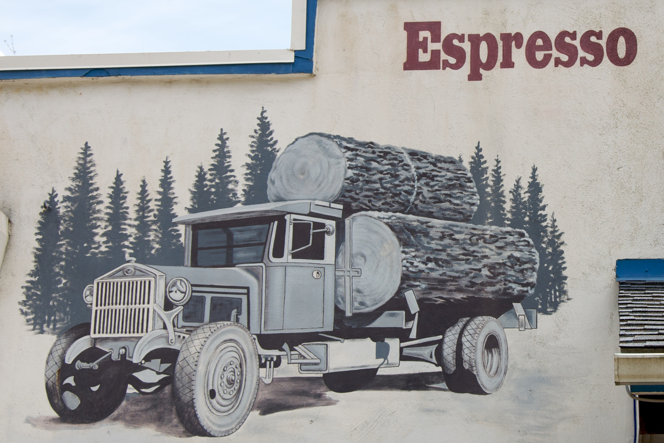 Sign in Mapleton, Oregon